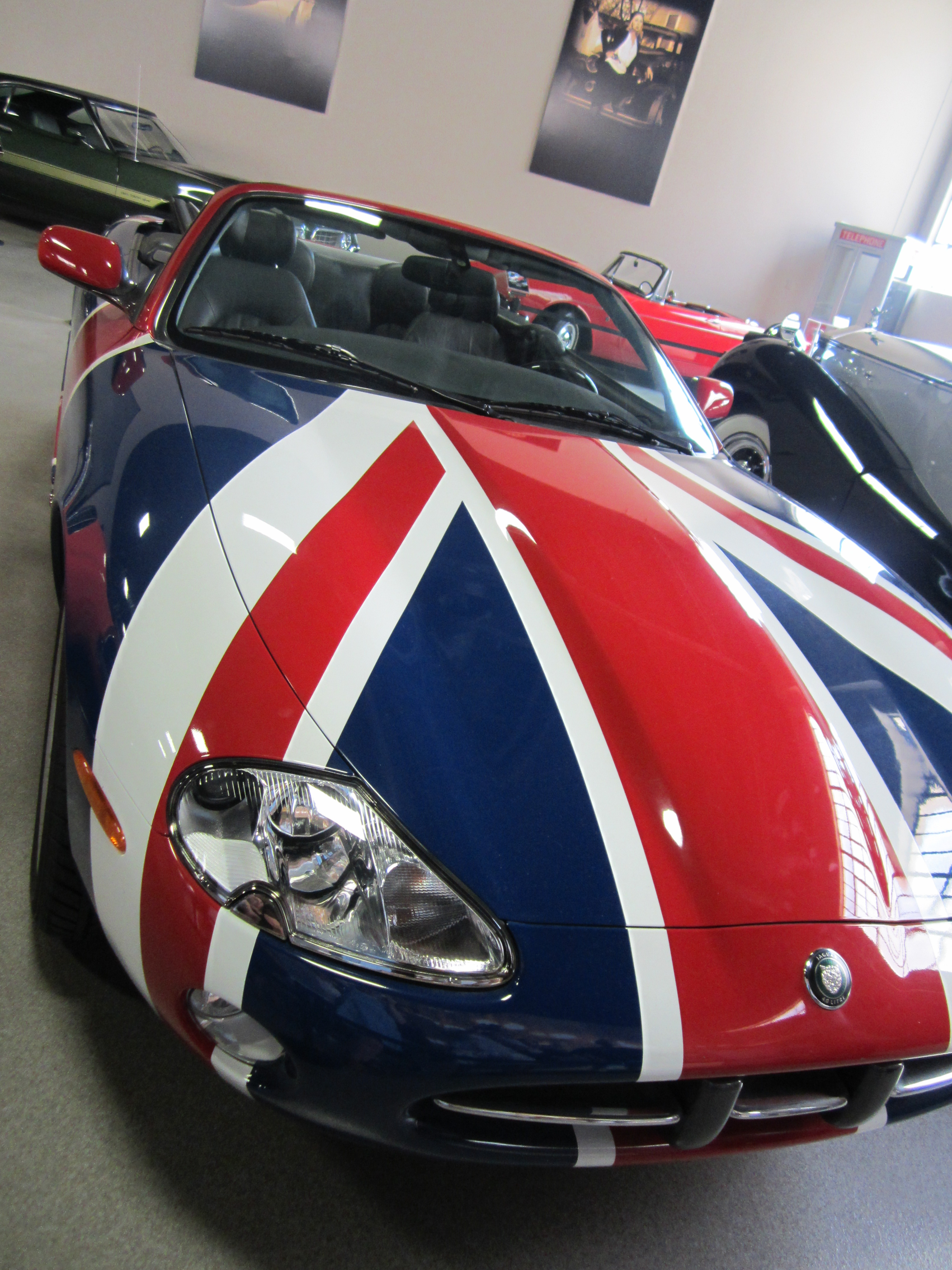 Jaguar d'Austin Power (Shaguar)